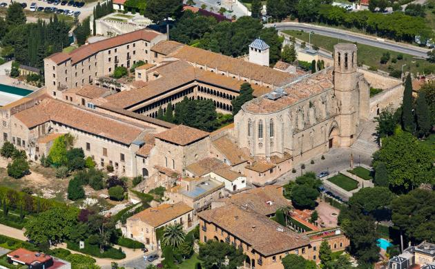 Vista aèria del Monestir de Pedralbes